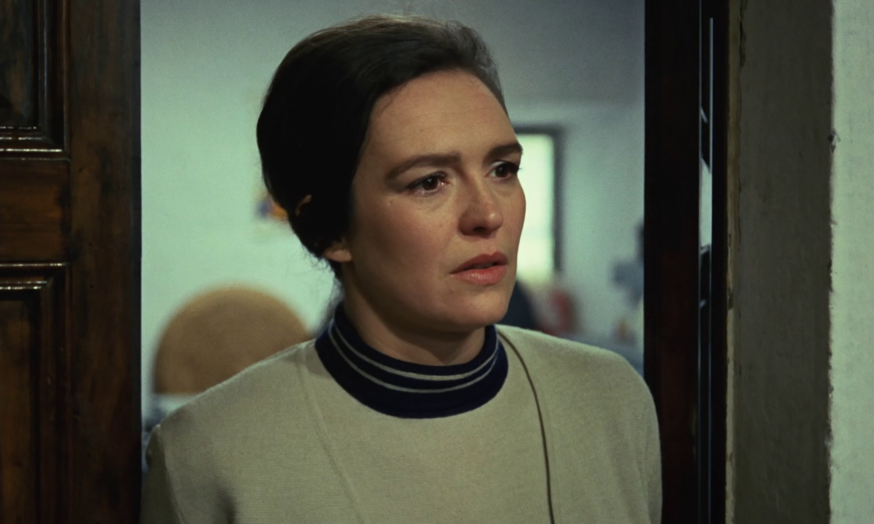 Scena dal film Sequestro di persona (1968)